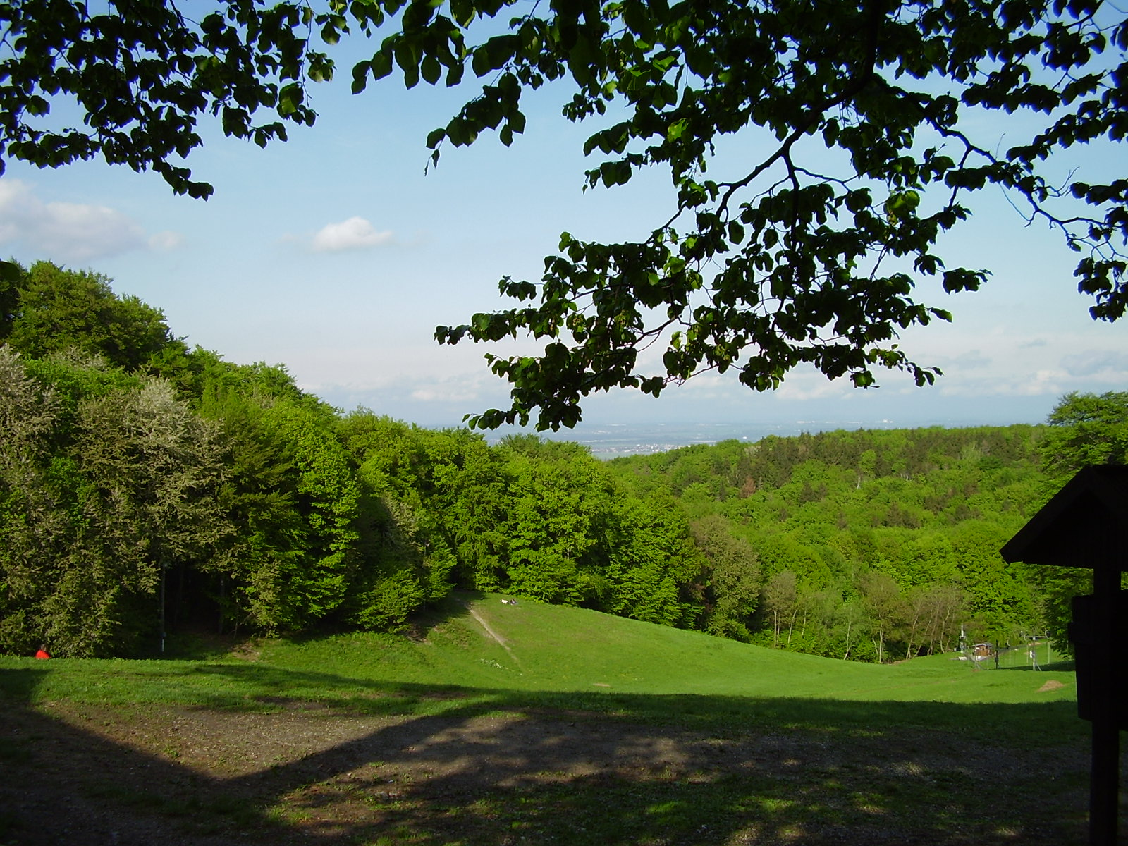 Partizánska lúka na Kolibe